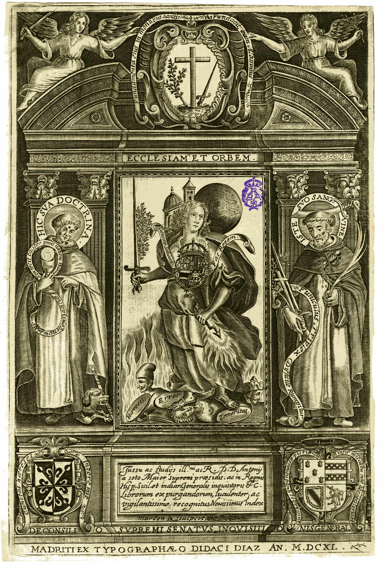 Alegoría de la Inquisición, frontispicio del Novisissimus librorum prohibitorum et expurgandorum index, Madrid, por Diego Díaz, 1640